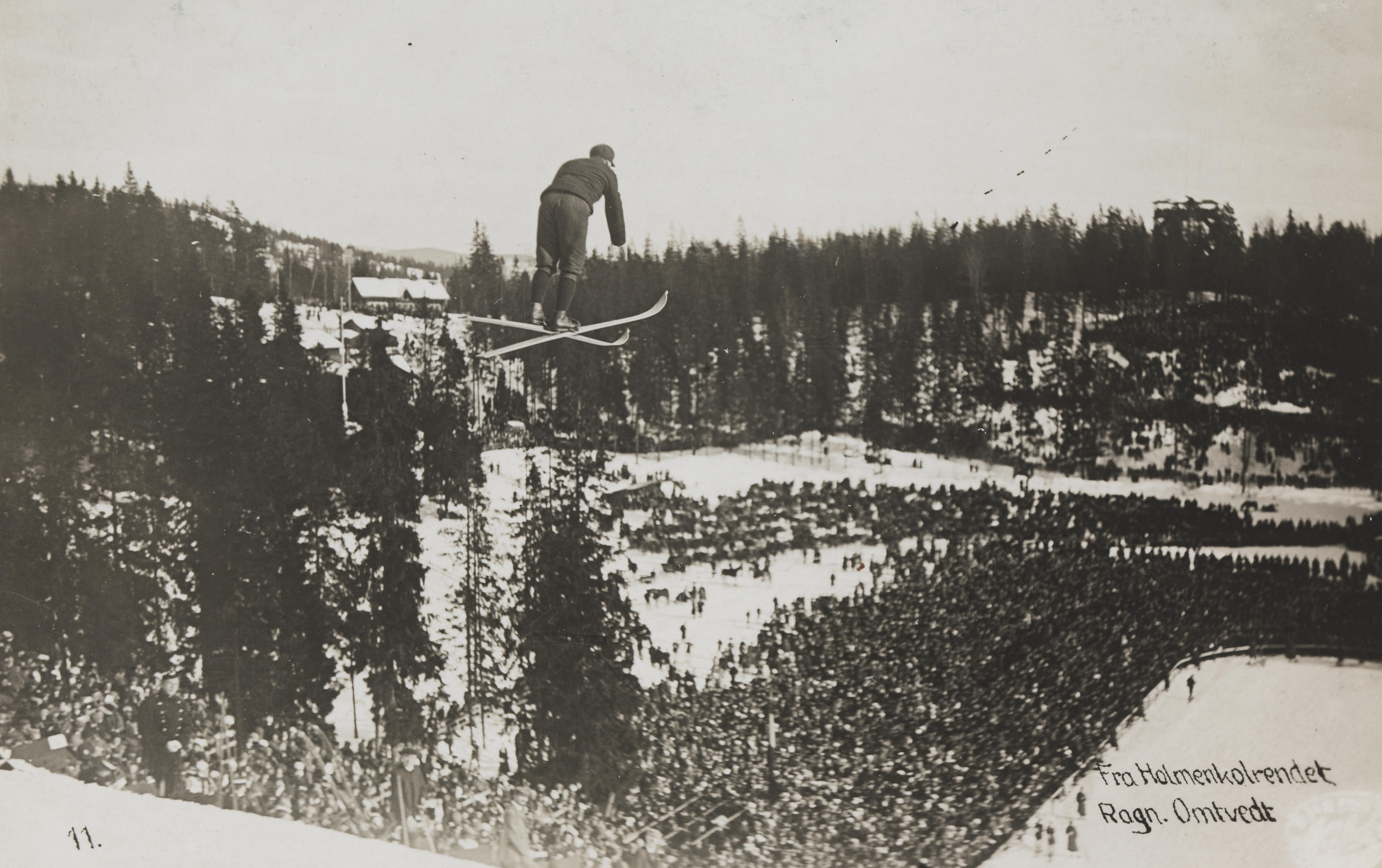 Bildet er hentet fra Nasjonalbibliotekets bildesamling Holmenkollbakken,Holmenkollen, Oslo, Oslo Depicted person: Omtvedt, Ragnar